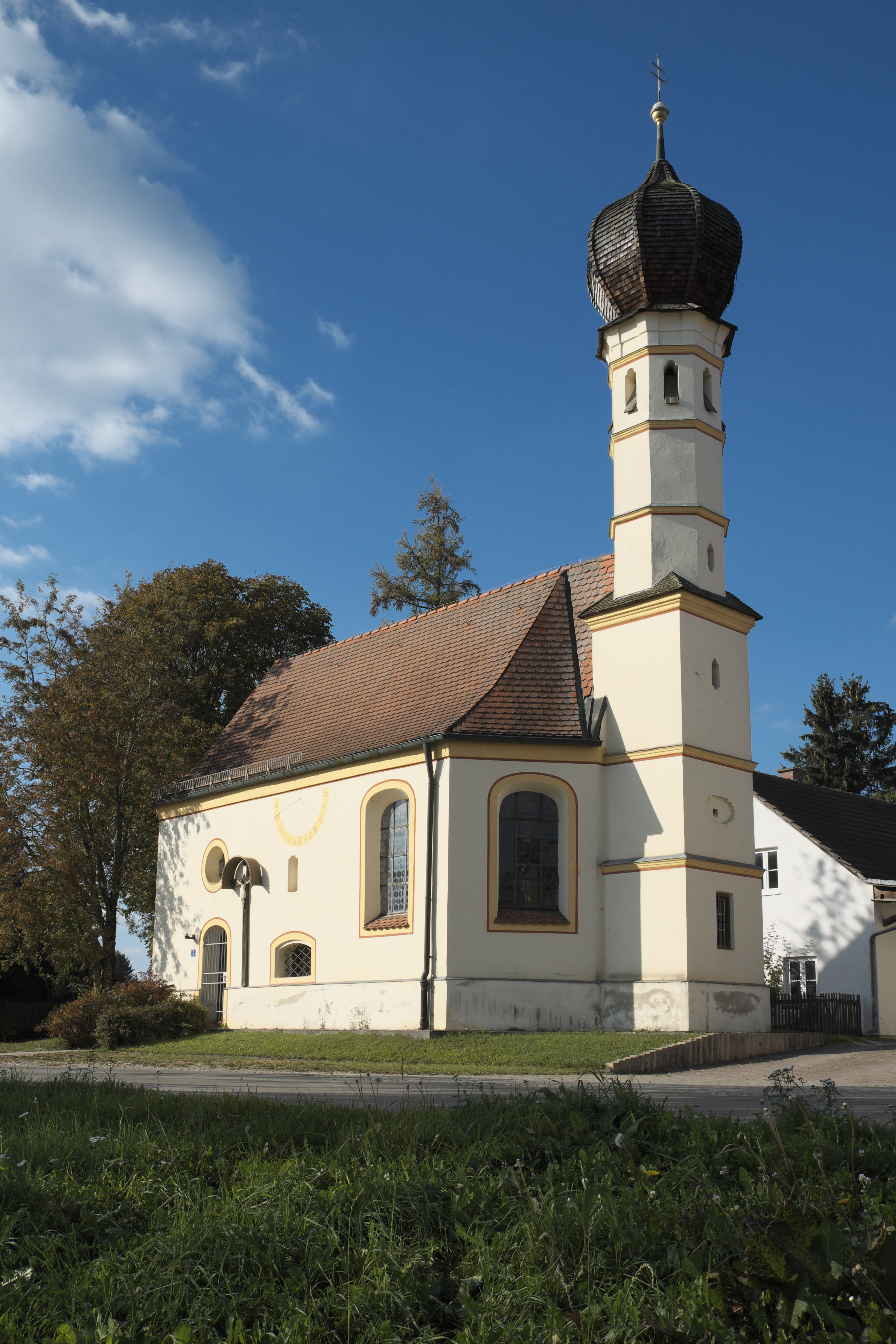 Katholische Filialkirche Unsere Liebe Frau in Machtenstein (Schwabhausen) im Landkreis Dachau (Bayern/Deutschland), Turm mit Zwiebelhaube